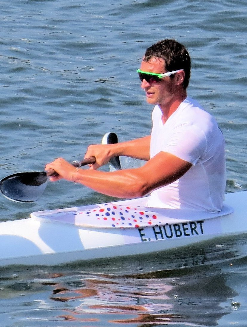 Sx50